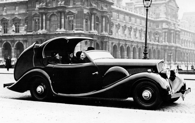 Peugeot 601 C Eclipse 1934 carrossée par Pourtout multi